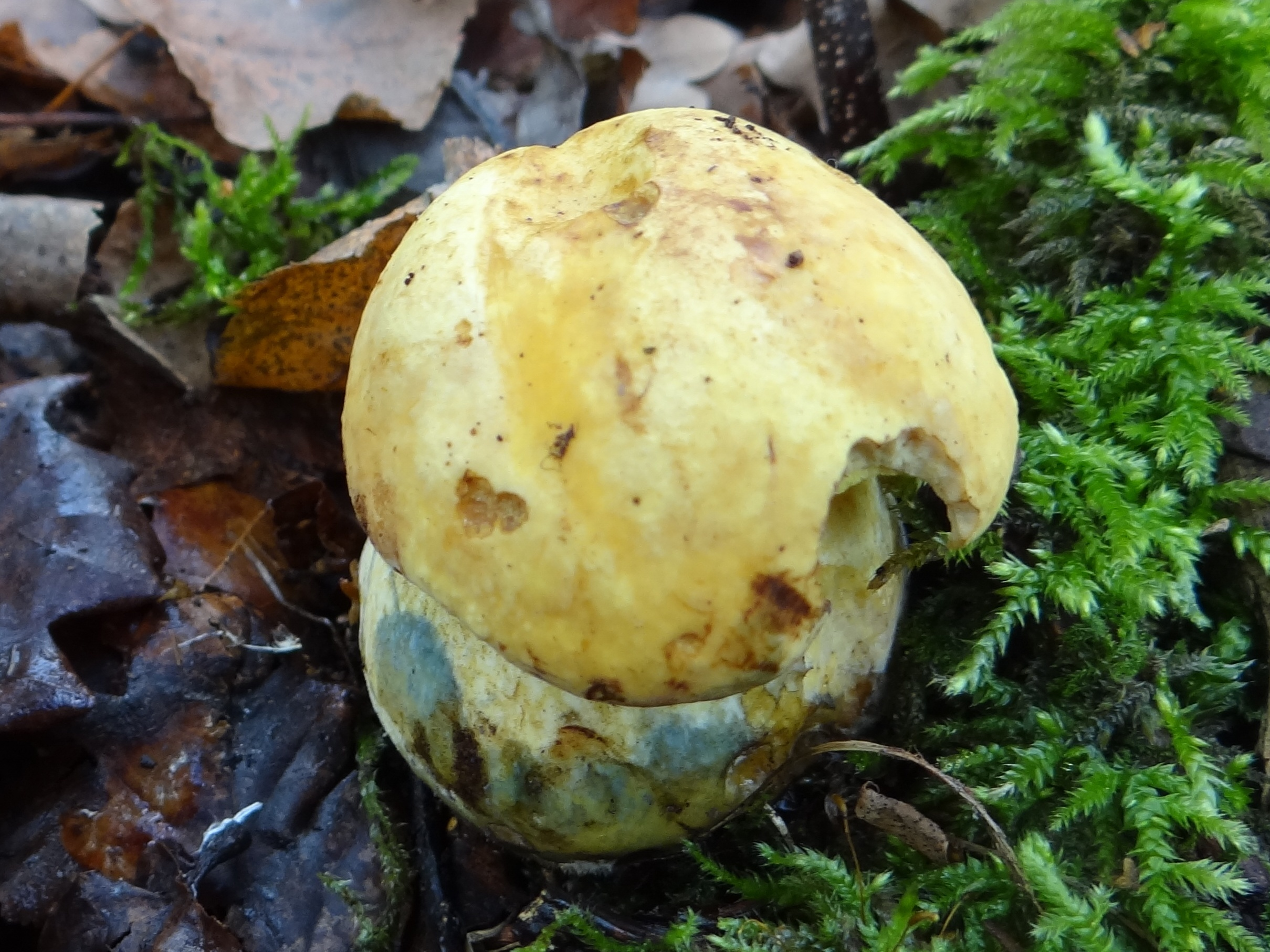 Boletus luridiformis var. junquilleus Siedlisko:Trzciana, woj. małopolskie, wzgórze Sepne, pod dębami.